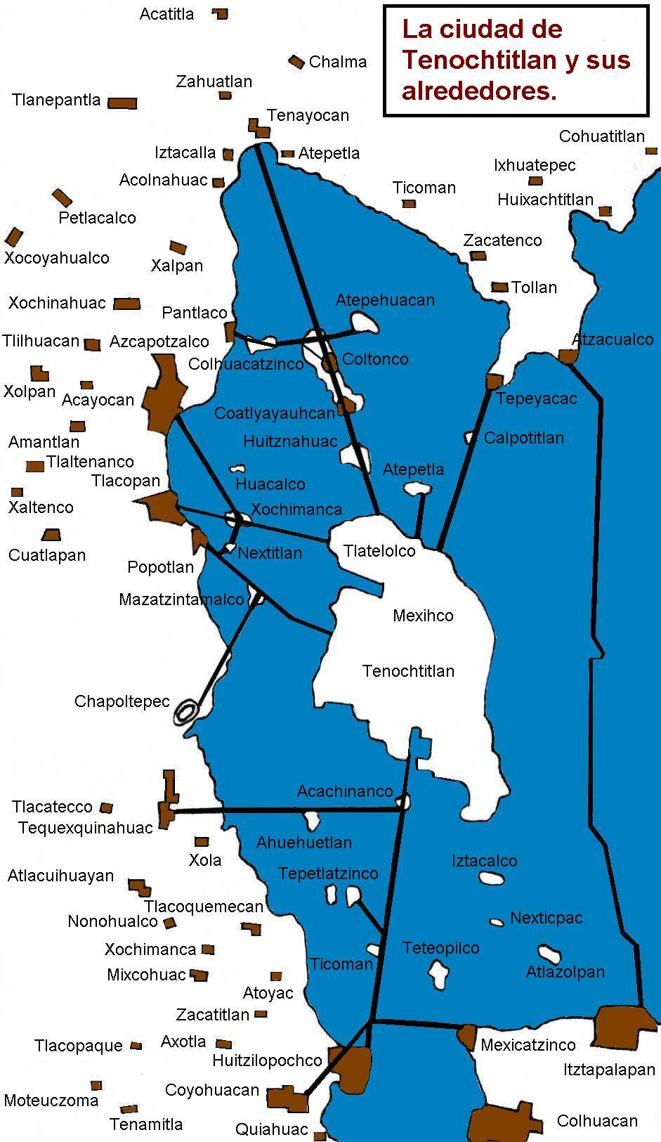 Copia de otra imagen, redibujado y con datos agregados